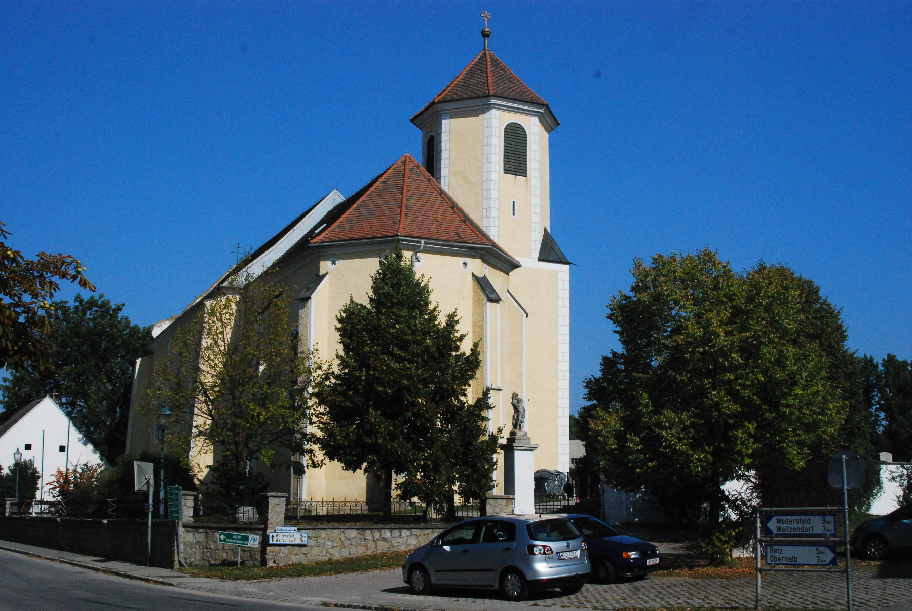 Pfarrkirche von Obermarkersdorf in Niederösterreich